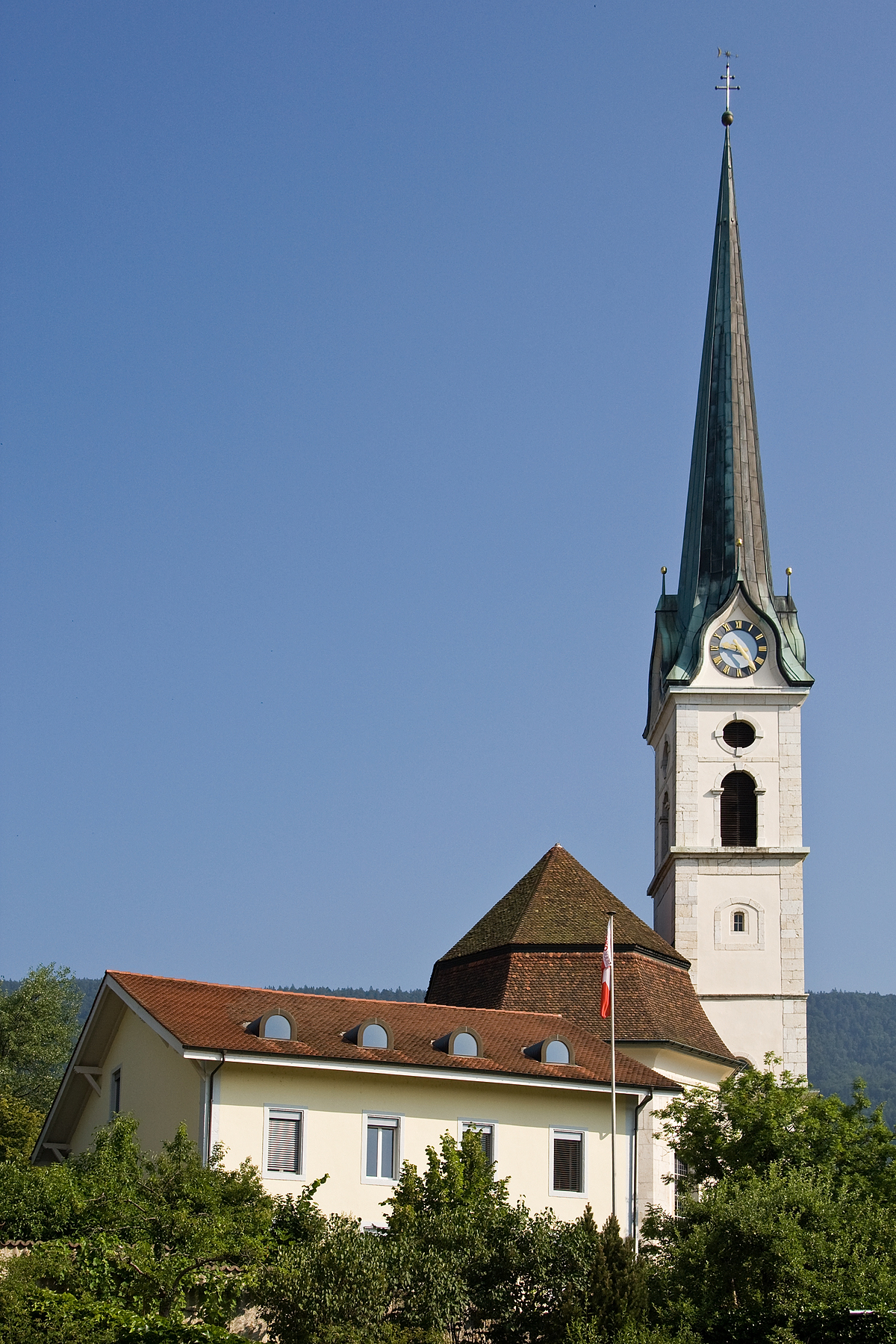 Pfarrkirche St. Eusebius (1805-1812) in Grenchen (SO)